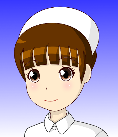 ナースキャップ